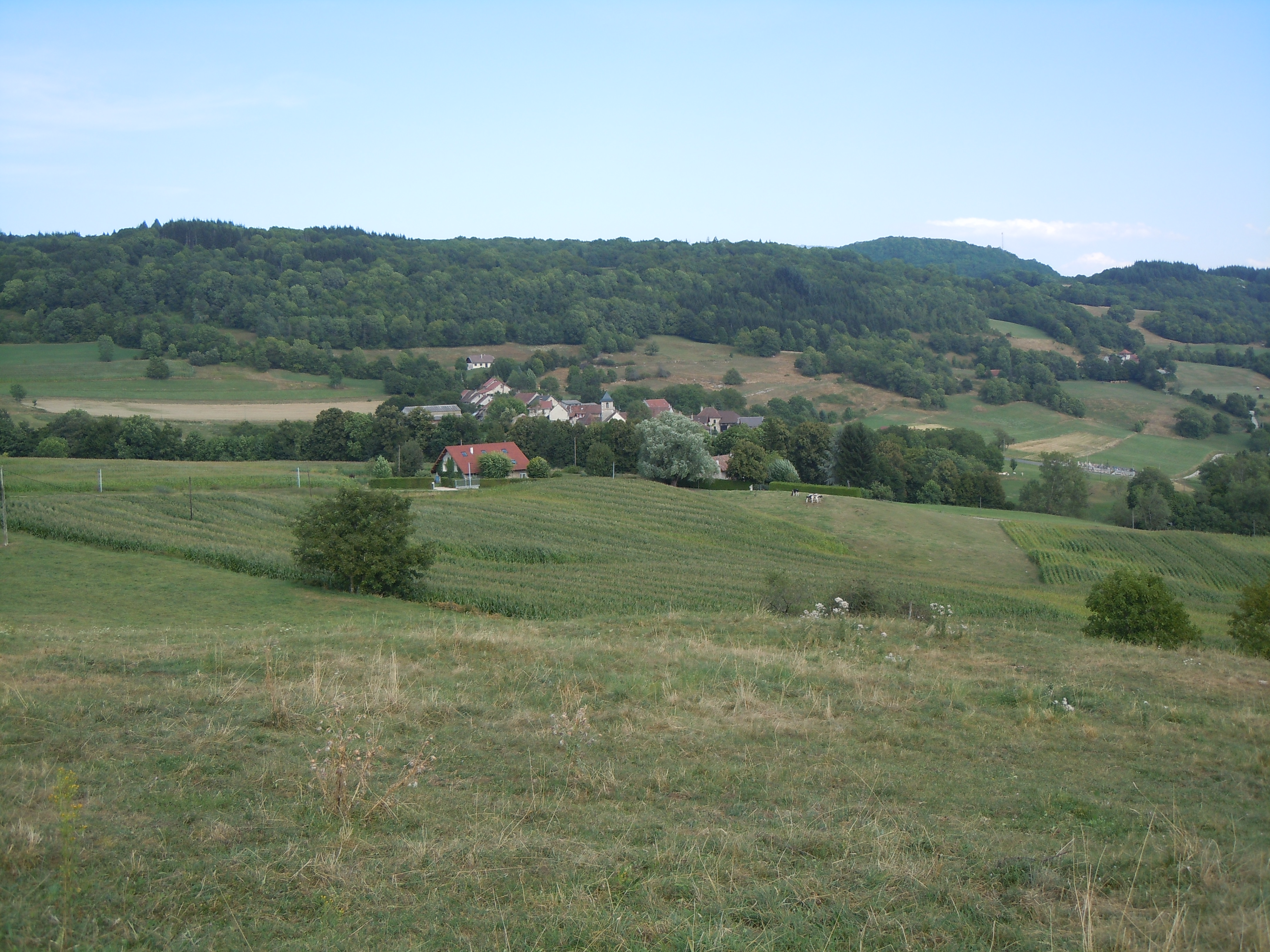 Saint-Maurice de Rotherens: vue générale - Savoie - France